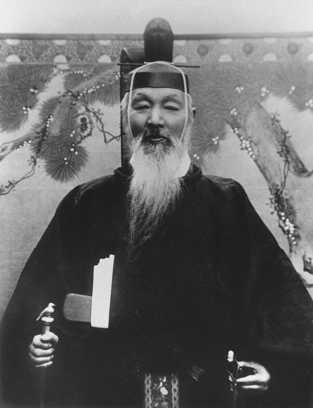 Portrait of Sasaki Takayuki (佐佐木高行, 1830 – 1910)